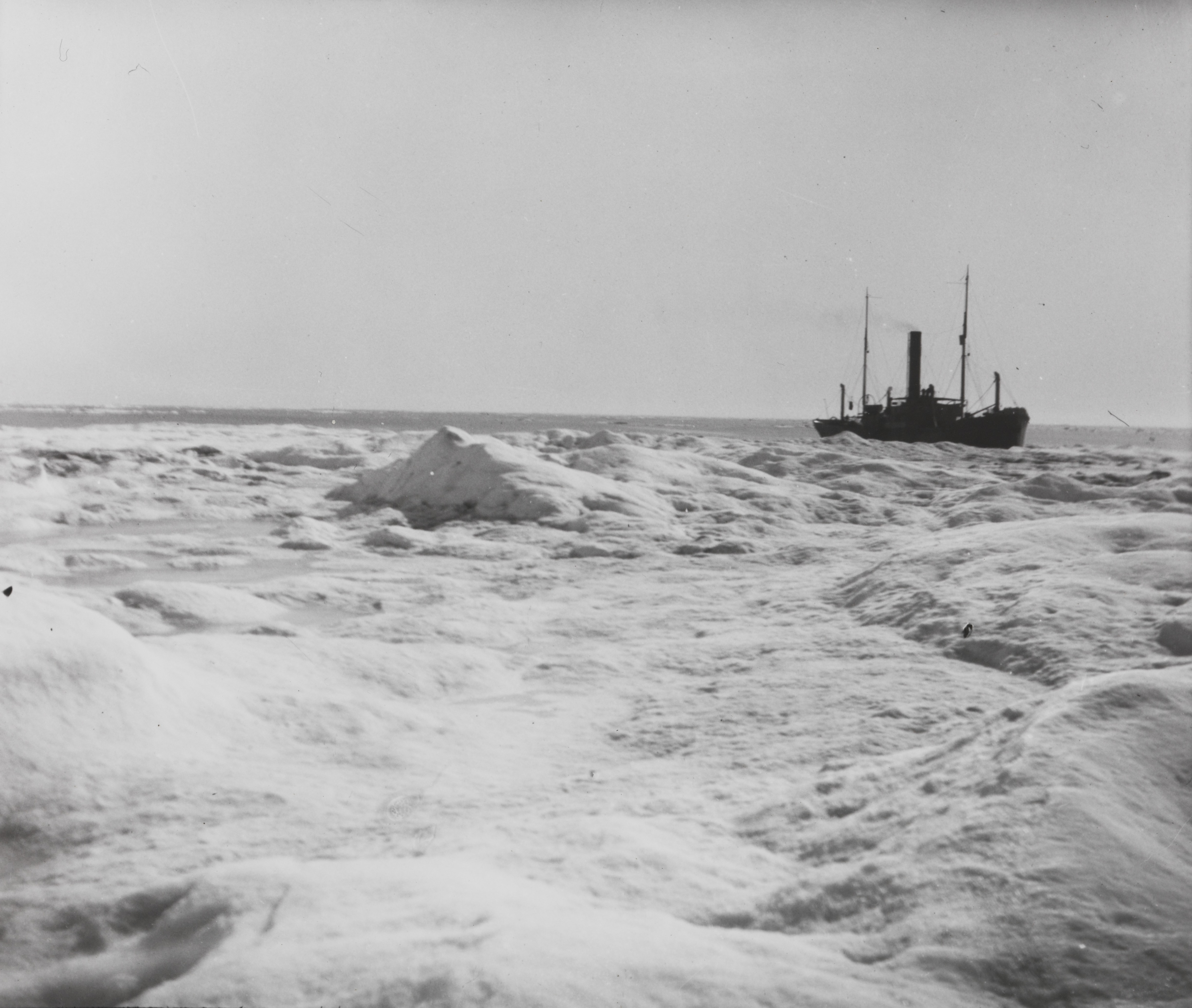 Dampskipet «Correct» ved kanten av den faste isen. Ett av bildene fra reisen til Sibir i perioden 2. august-26. oktober 1913. Fridtjof Nansen startet sin transsibirske reise med et handelsskip fra Oslo til Jenisej. Ferden gikk gjennom deler av nordøstpassasjen som skulle åpne for en kortere handelsforbindelse mellom Vest Europa og Det Fjerne Østen. Depicted place: Karahavet